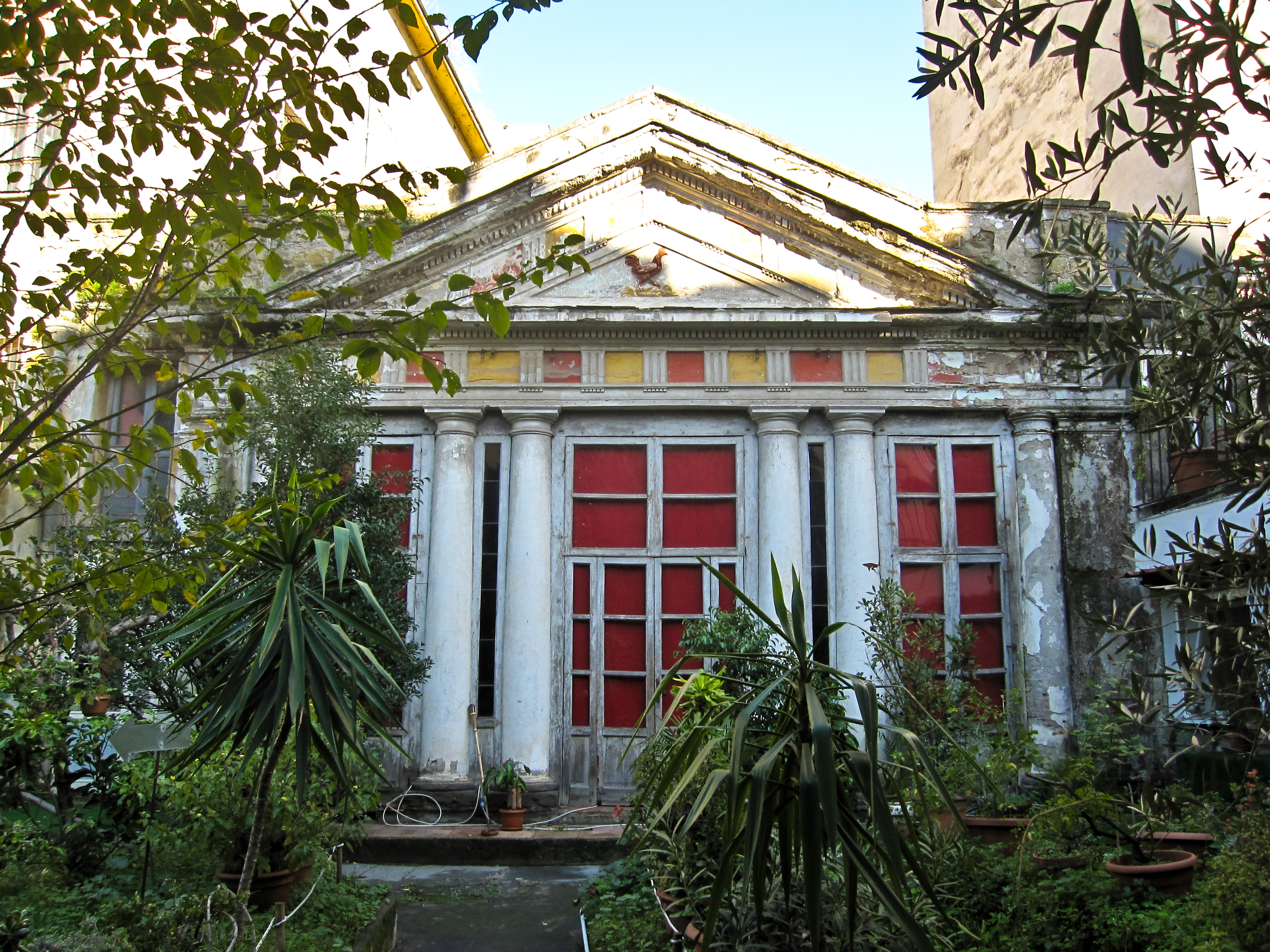 La casina pompeiana posta nel giardino pensile. Palazzo Venezia di Napoli.